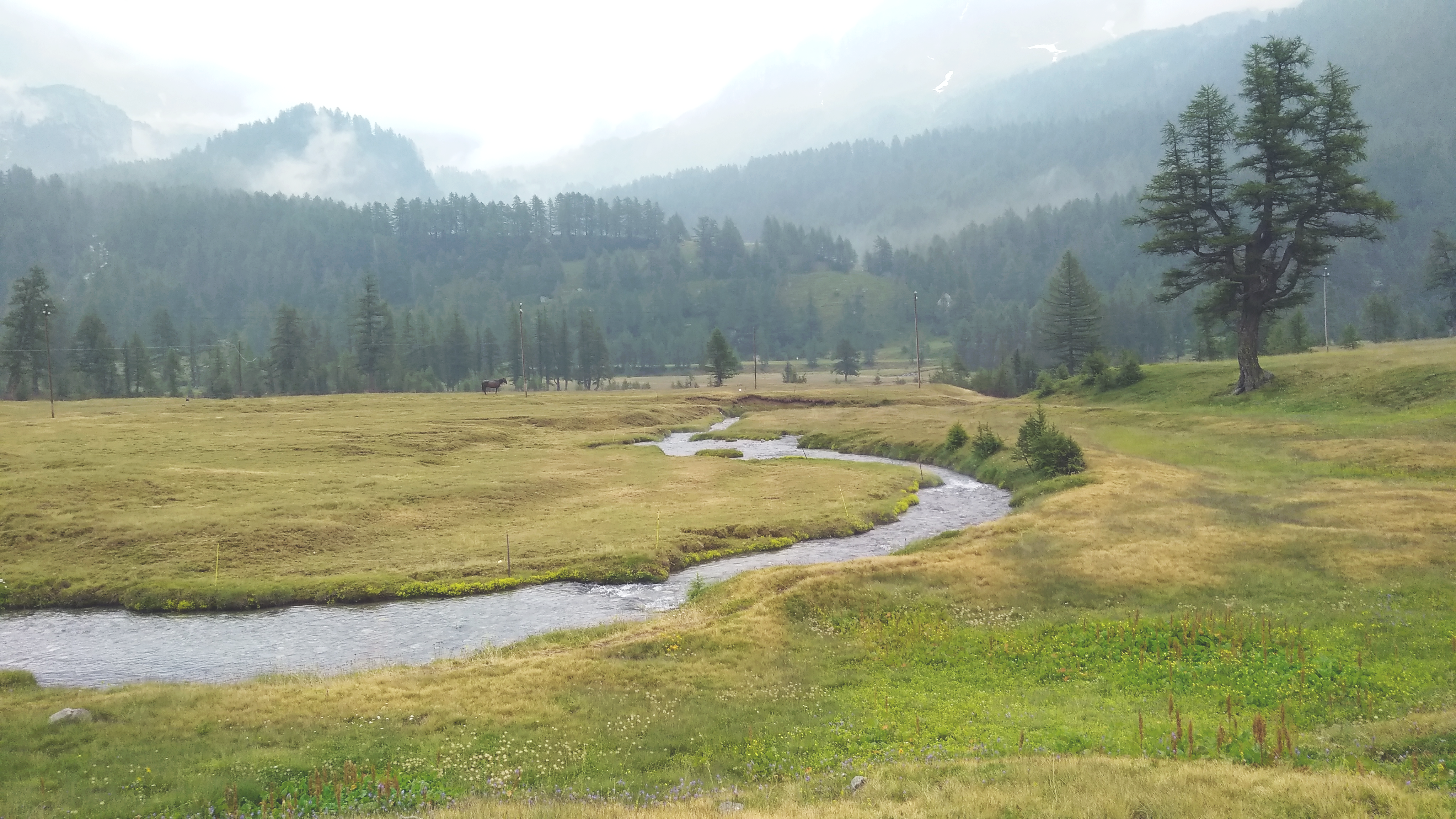 Parco naturale dell'Alpe Veglia e dell'Alpe Devero - l'Alpe Veglia di sera This is a photo of a monument which is part of cultural heritage of Italy.